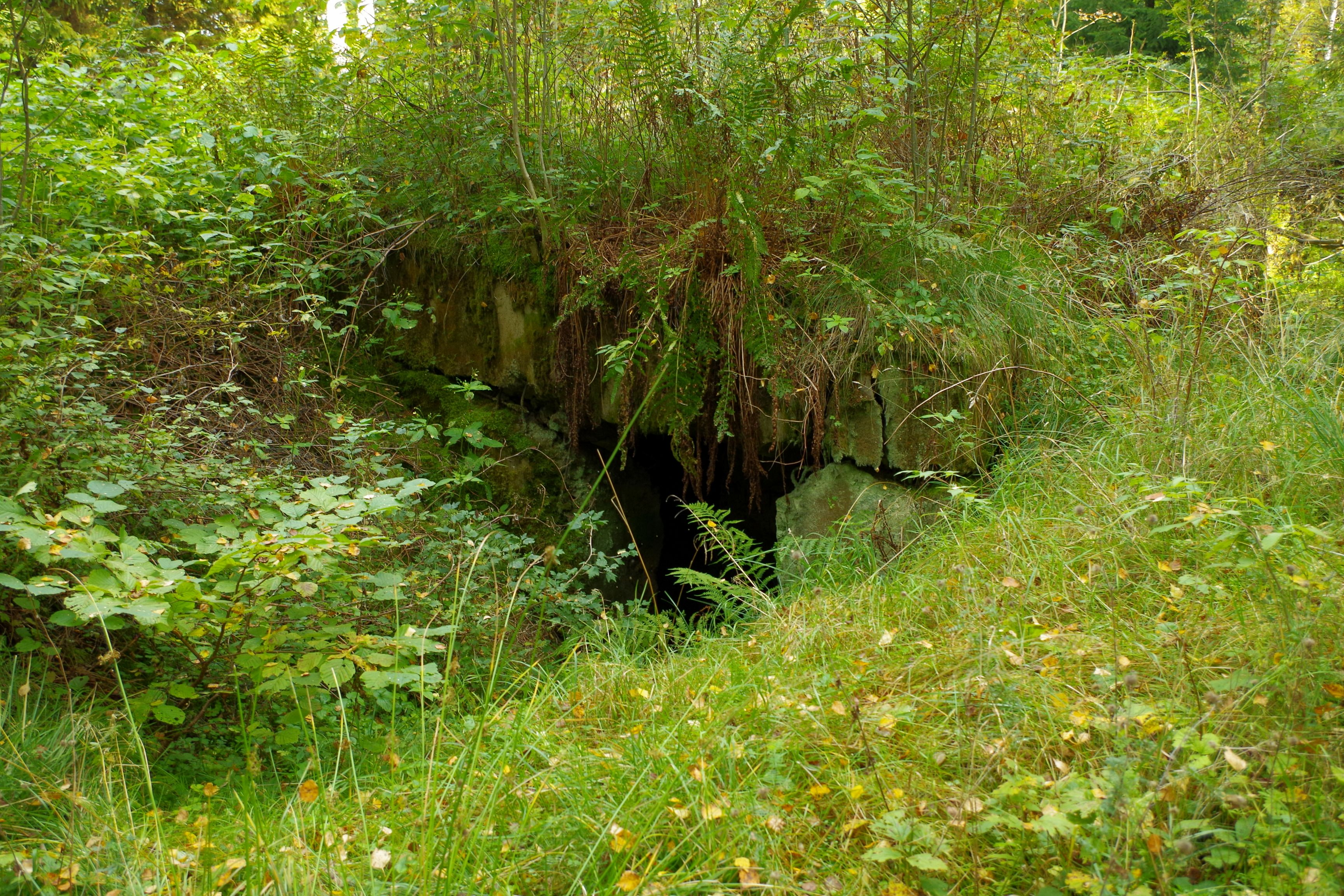 Tammneeme rannakaitsepatarei, 1928-1930. a.